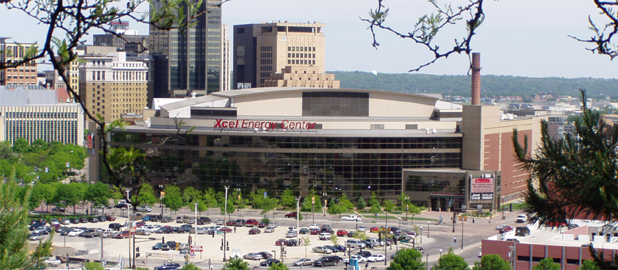 Xcel Energy Center taken from Selby Av:2006